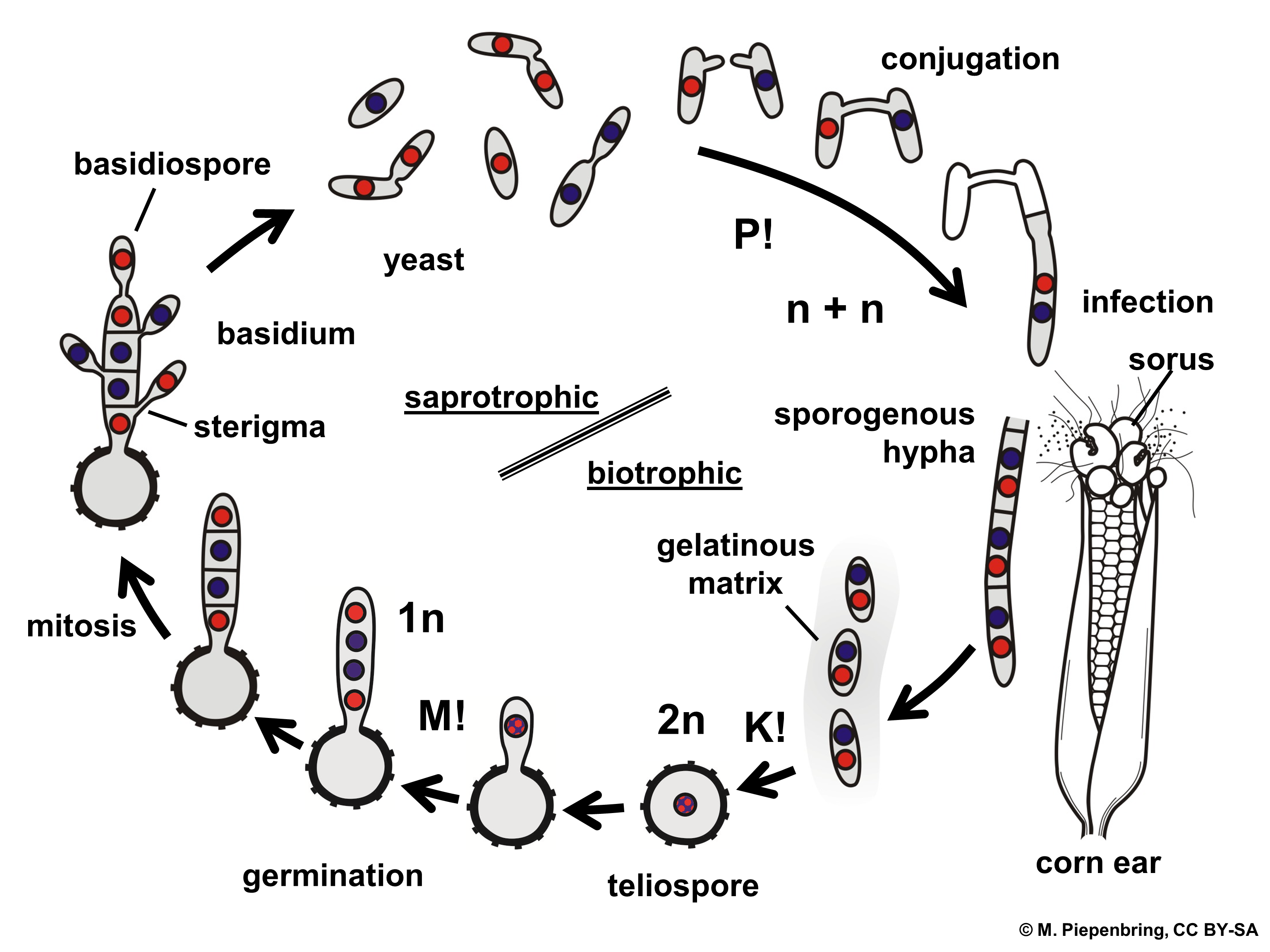 Biologische Schemata, gezeichnet und freigegeben von M. Piepenbring